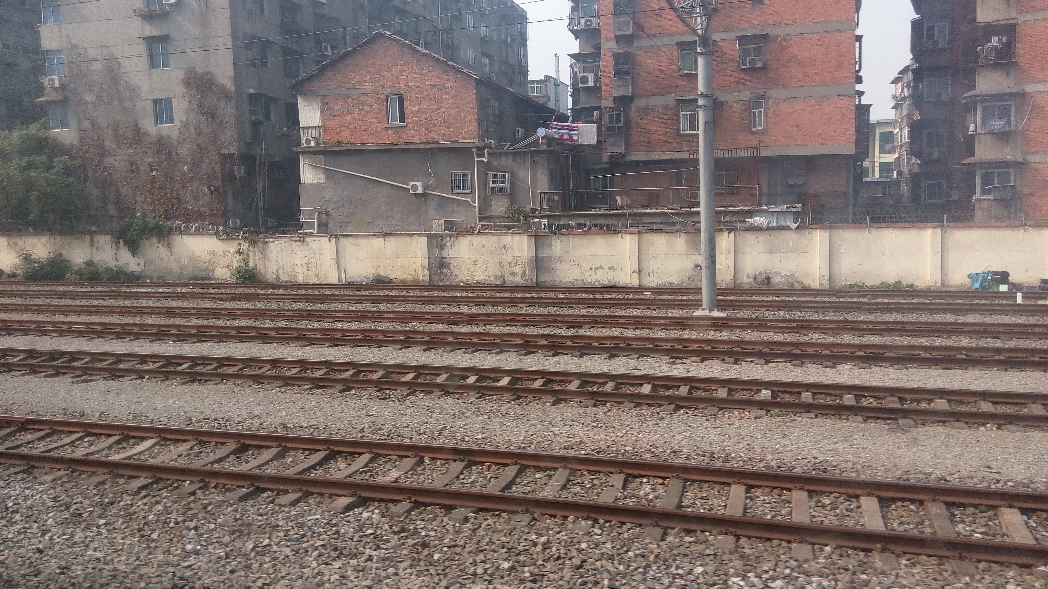 南昌站二场